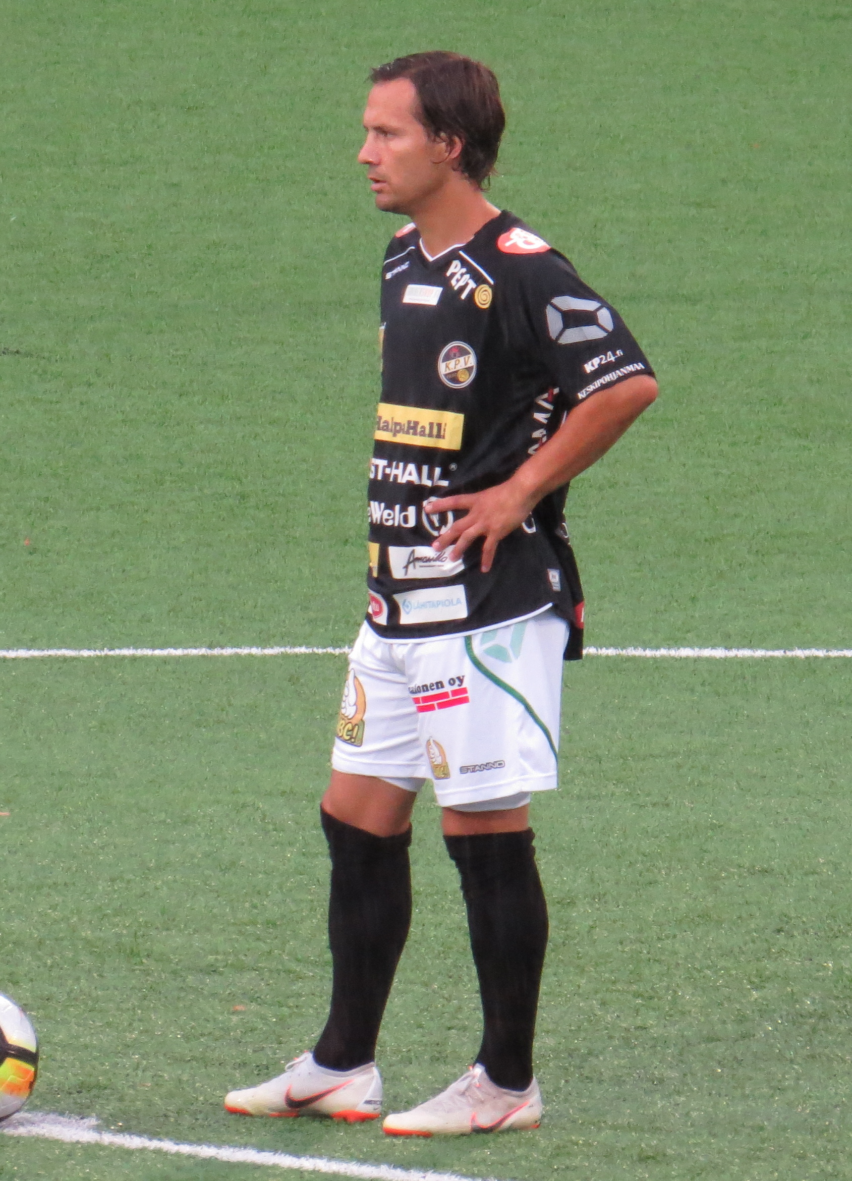 Suomalainen jalkapalloilija Sebastian Mannström Kokkolan Pallo-Veikkojen joukkueessa kaudella 2018.